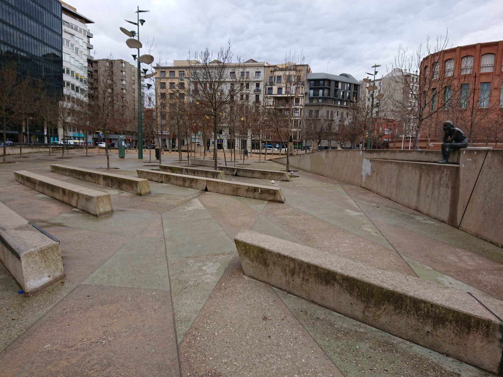 Aspecte actual de la plaça de l'1 d'octubre del 2017 de Girona, amb data 12 de febrer del 2018.